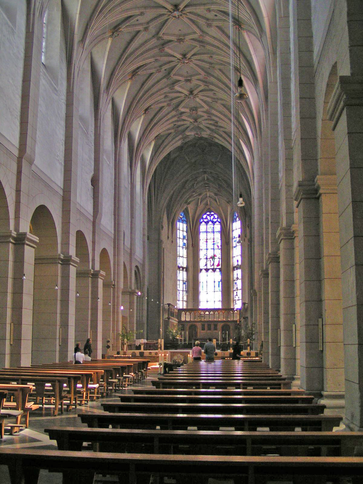 Mëttelschëff St Matthias.